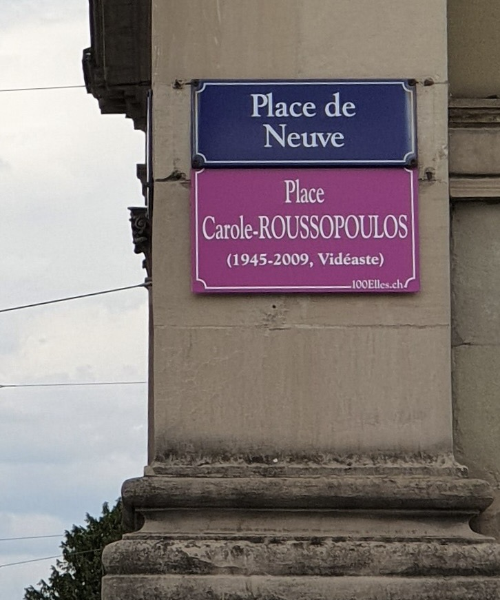 Plaque temporaire de rue apposée dans le cadre du projet 100elles à Genève en 2019